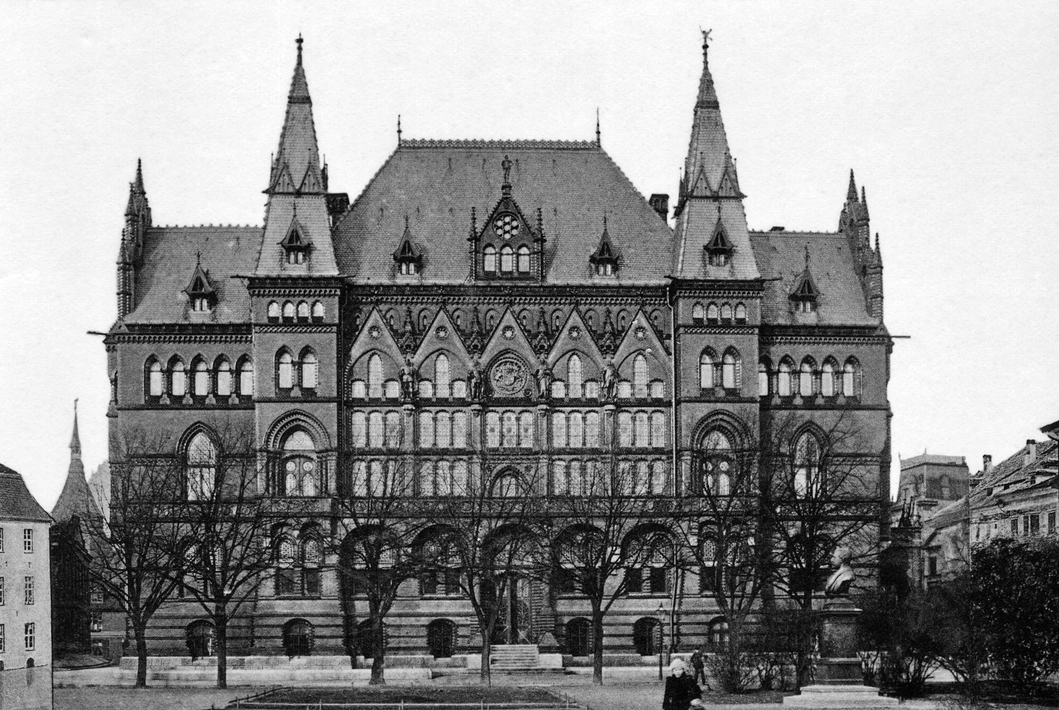 Rostock, Ständehaus um 1885